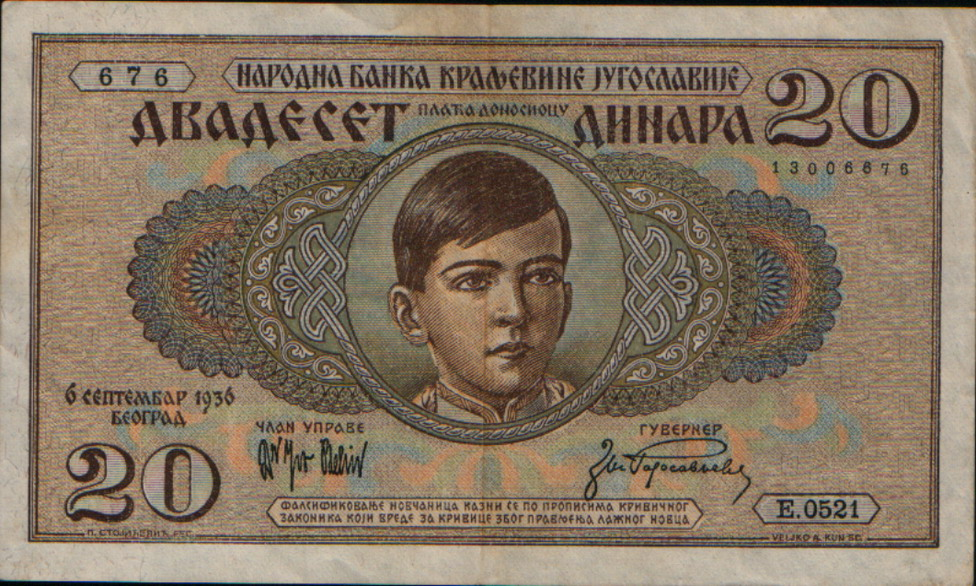 20 Yugoslav dinars note (1929 version of 1918 dinar)